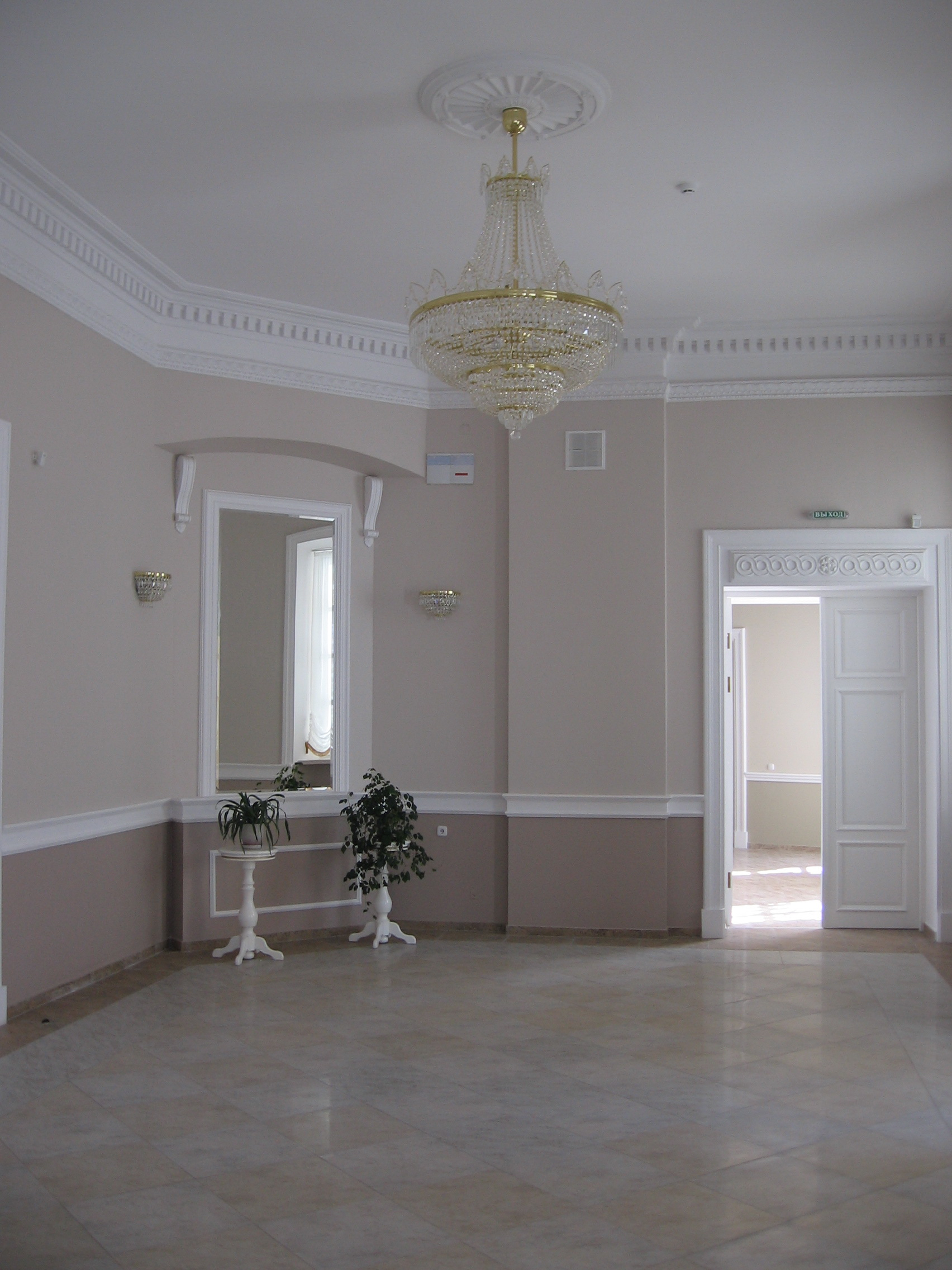 Беларуская (тарашкевіца): Будынак былога палаца Бутрымовіча. г. Пінск This is a photo of Belarusian heritage monument. Reference number: 112Г000539 ( WLM)